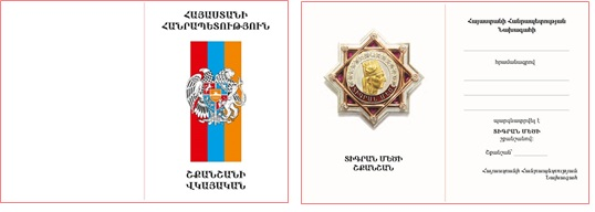 «Տիգրան Մեծ» շքամշանի վկայական